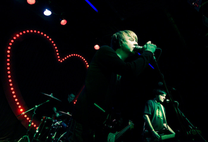 Группа Hot Zex на сцене клуба 16 тон, город Москва.